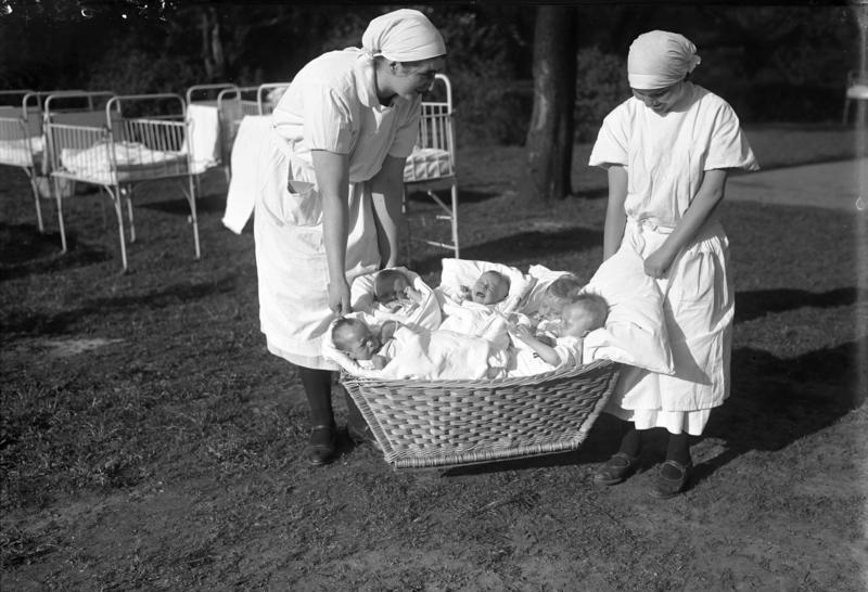 Jahrgang 1932! Die jüngsten Berliner. Die Kleinen, welche am 1. Januar 1932 in einem Berliner Heim das Licht der Welt erblickten.